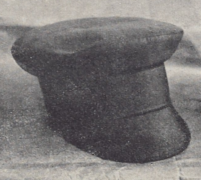 Casquette à trois ponts, dite « Desfoux »